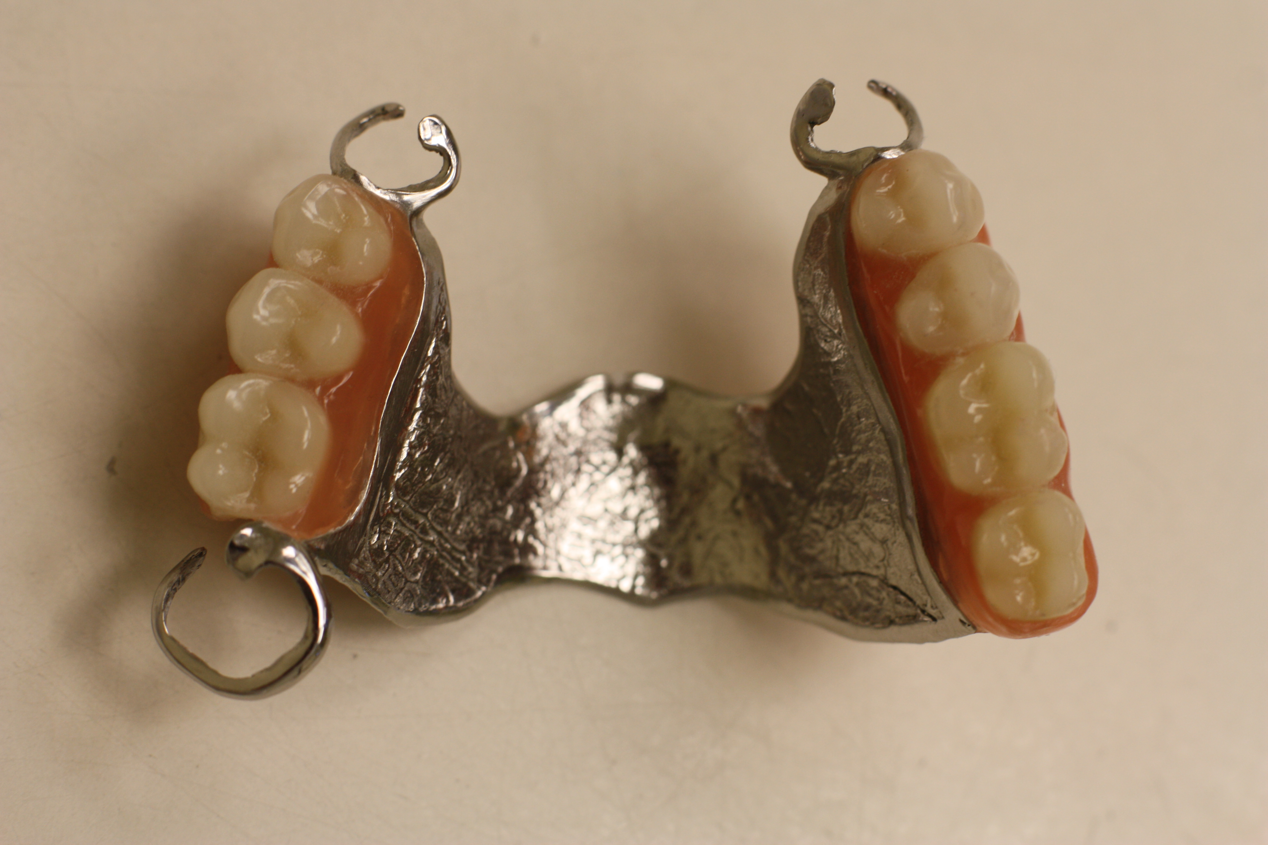 Teilprothese, Modellguss, Modellgussprothese